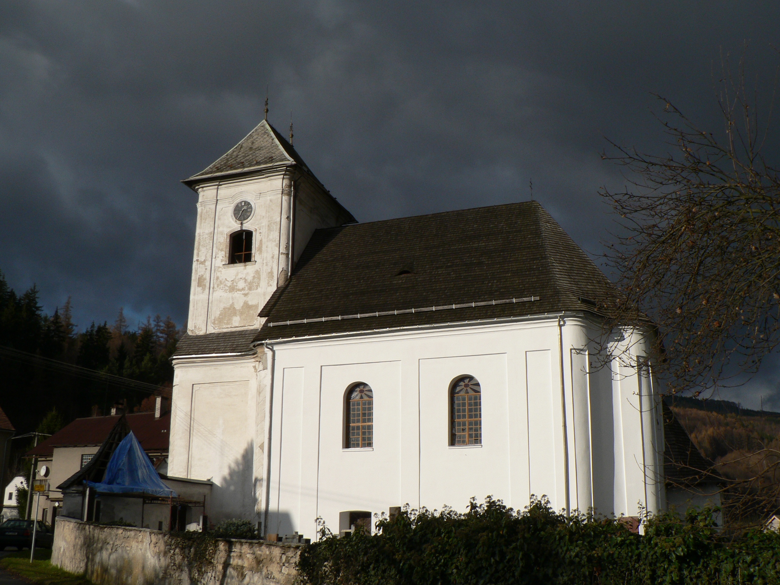 Kostel svatého Jana Křtitele (Raškov)